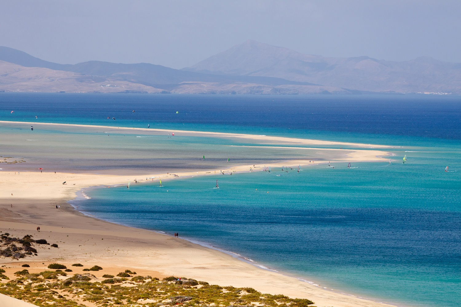 Wind- und Kitesurfen an der Playa de Sotavento (Sotavento Beach), Fuerteventura, Kanarische Inseln, Spanien